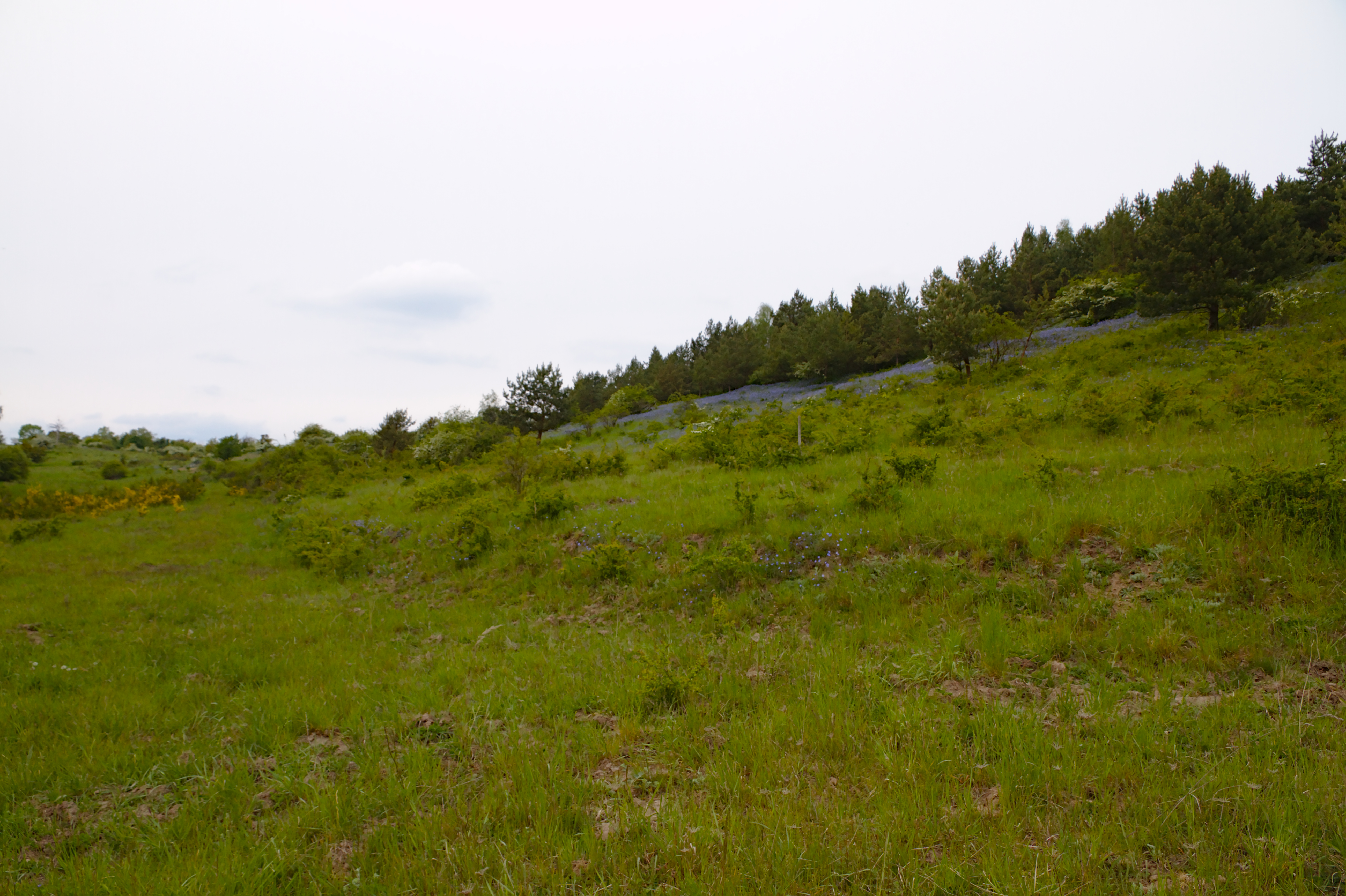 Blick in westlicher Richtung aus einer Tallage hinauf in der Hutelandschaft Altranft-Sonnenburg